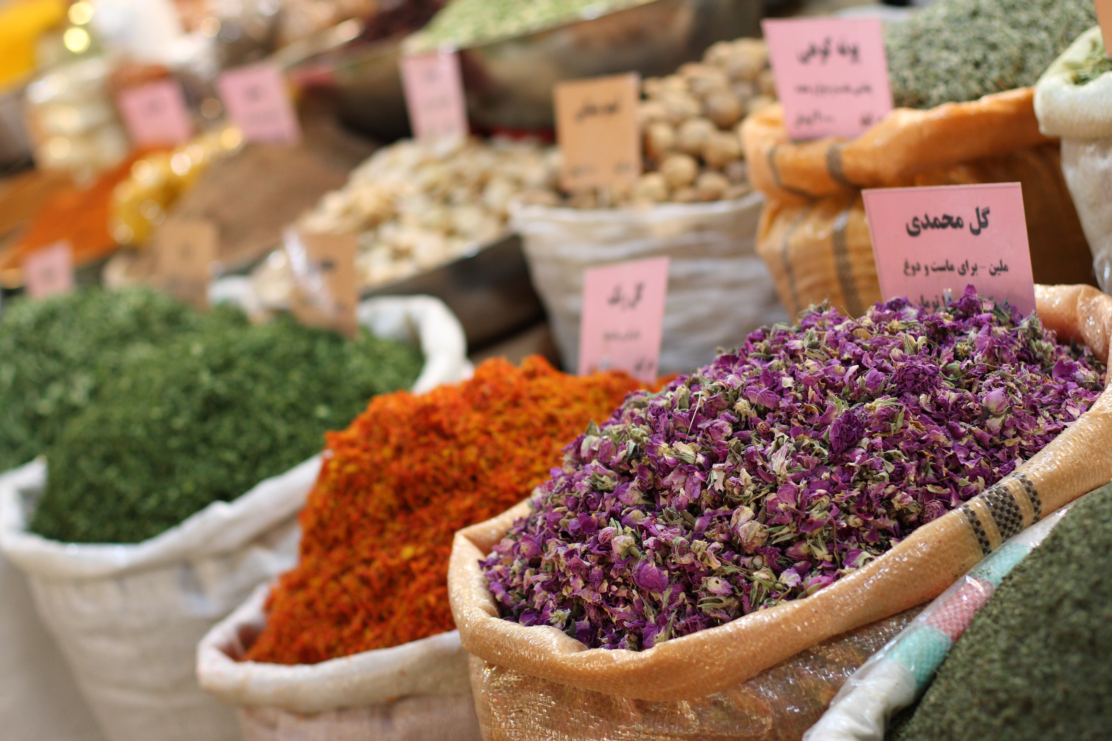 Bazar-e Bozorg, Esfahan, Iran